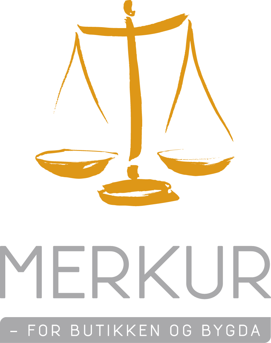 Slogan for the Merkur-programme